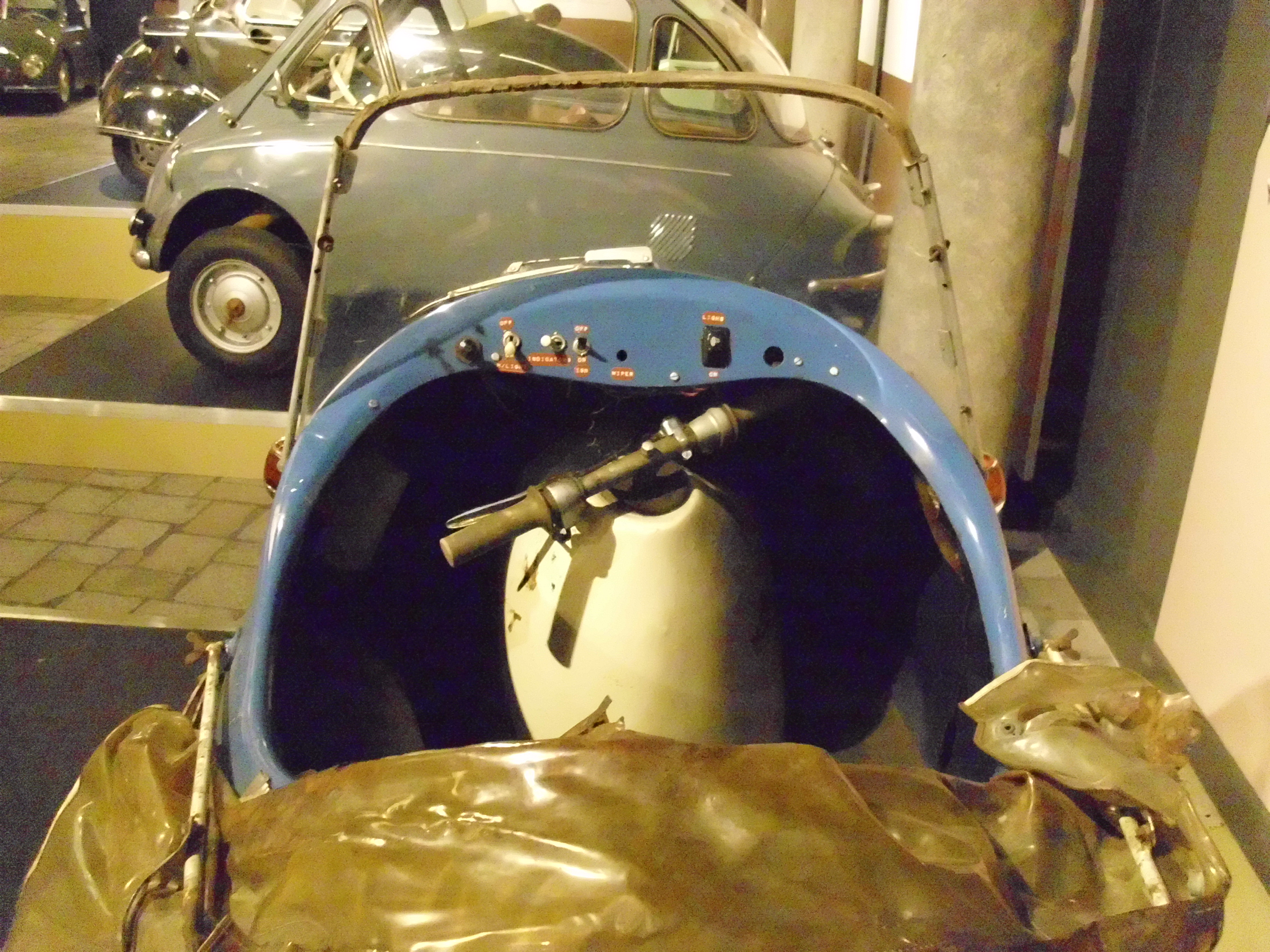 Mopetta GmbH Mopetta Interieur